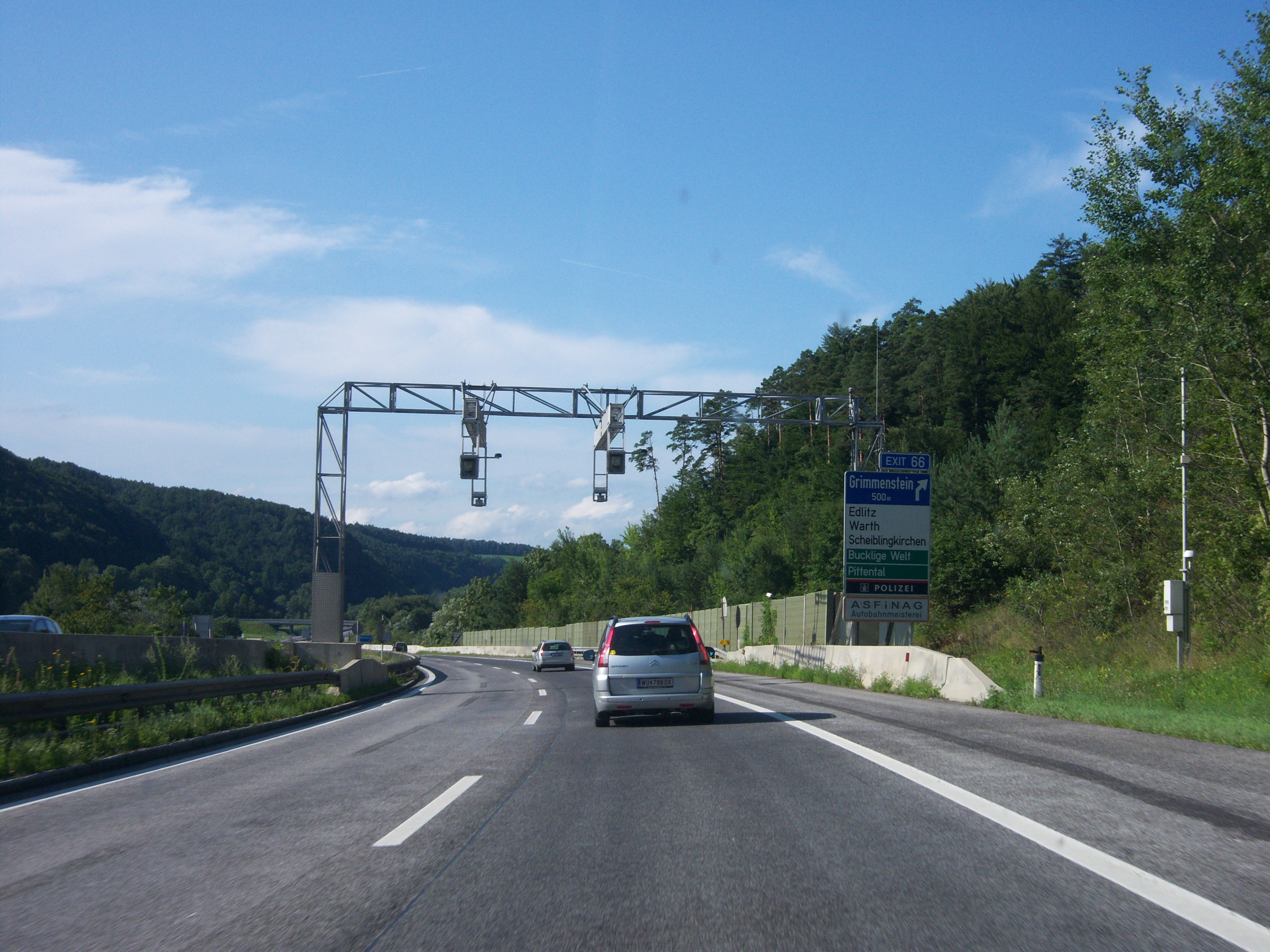 Süd Autobahn A2 Richtung Wien im Bereich der Anschlussstelle Grimmenstein beim Ende der Section Control